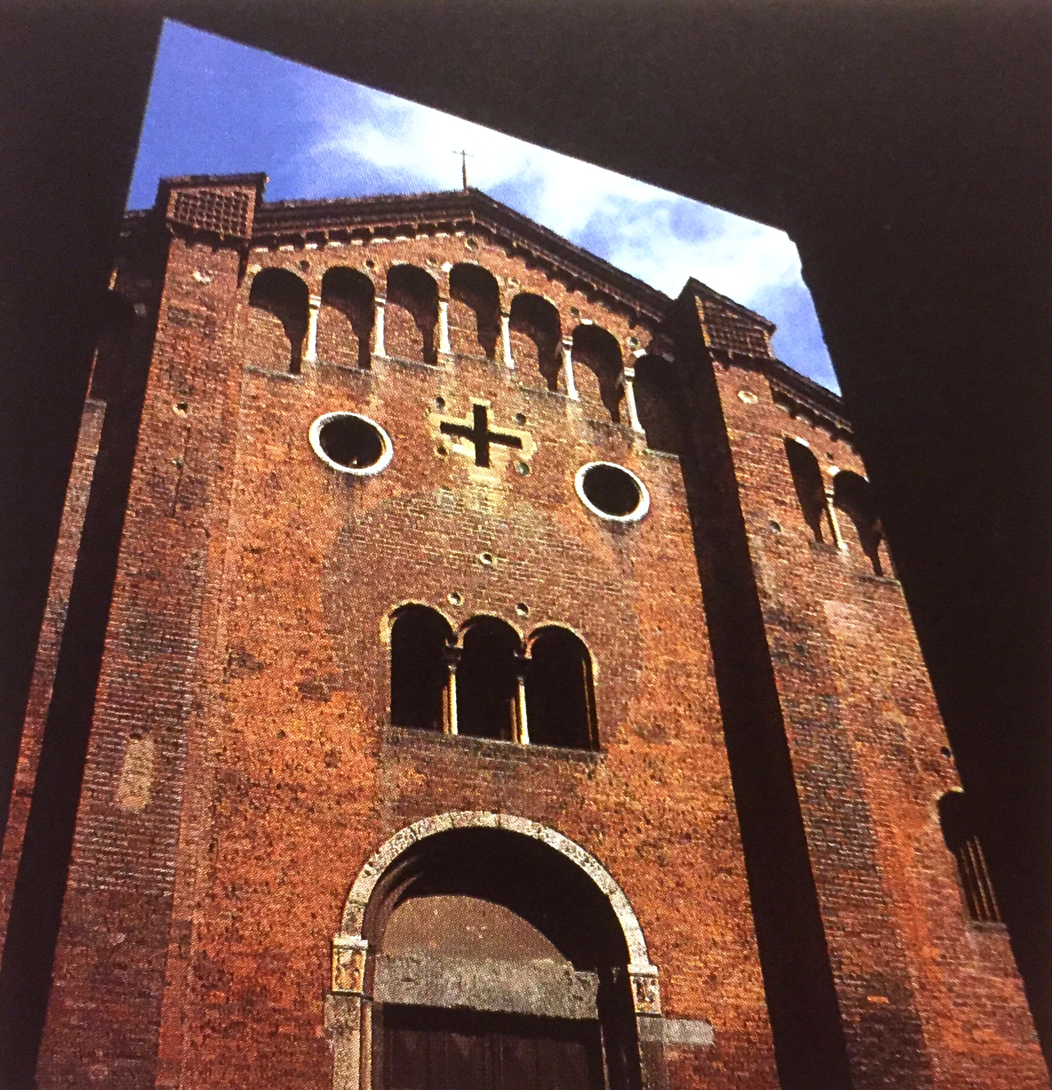 Facciata della chiesa di San Teodoro